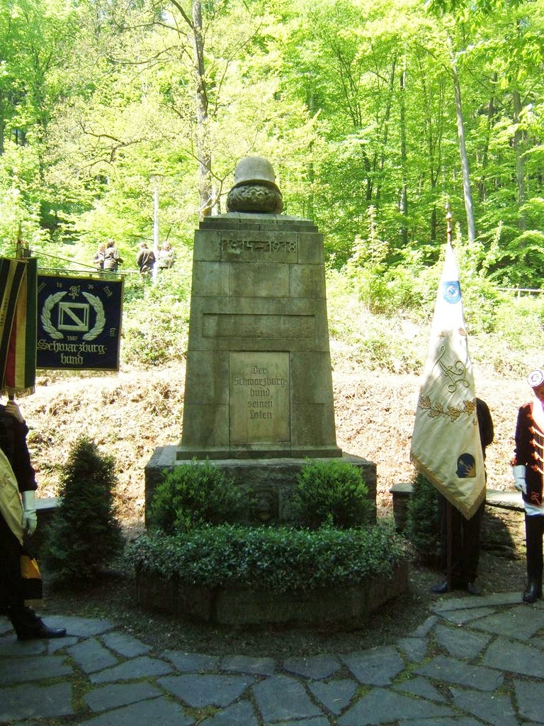 Ehrenmahl des Schwarzburgbundes in Schwarzburg (Thüringen)